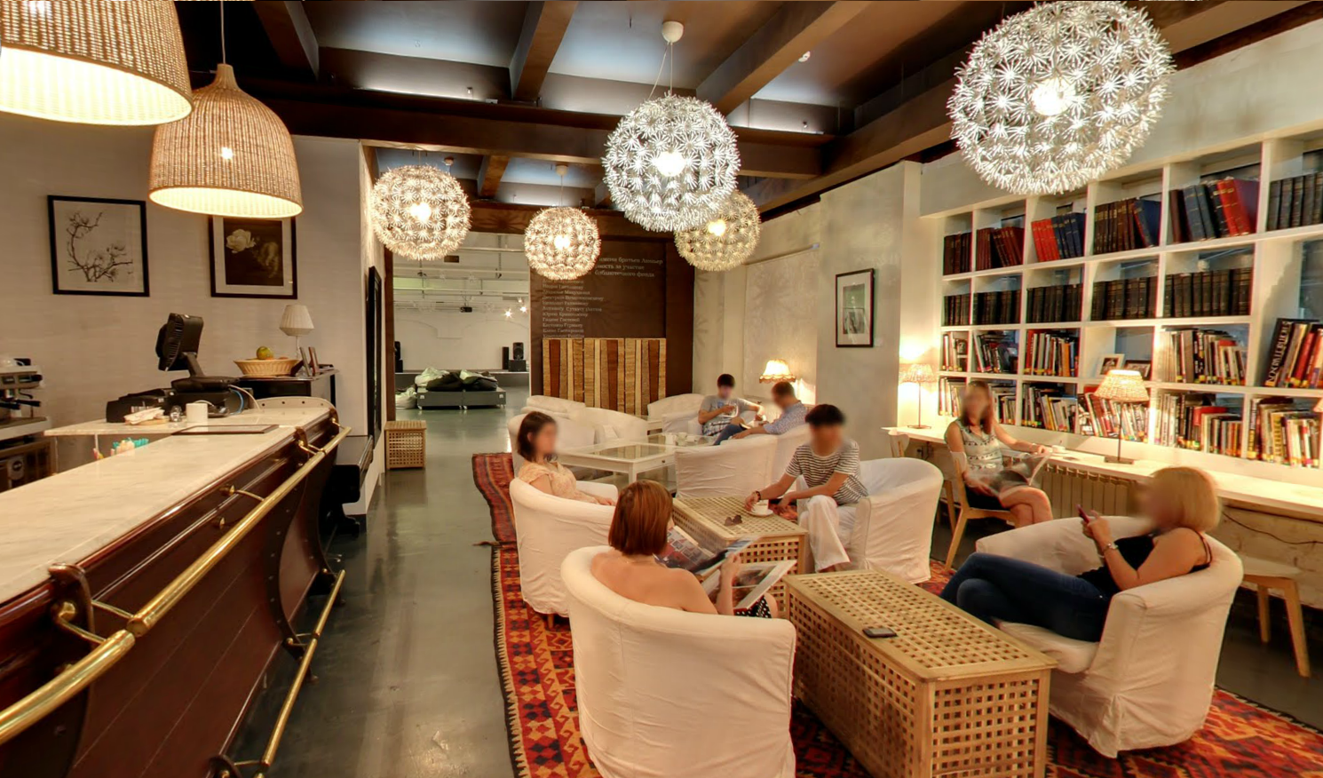 Библиотека и кафе